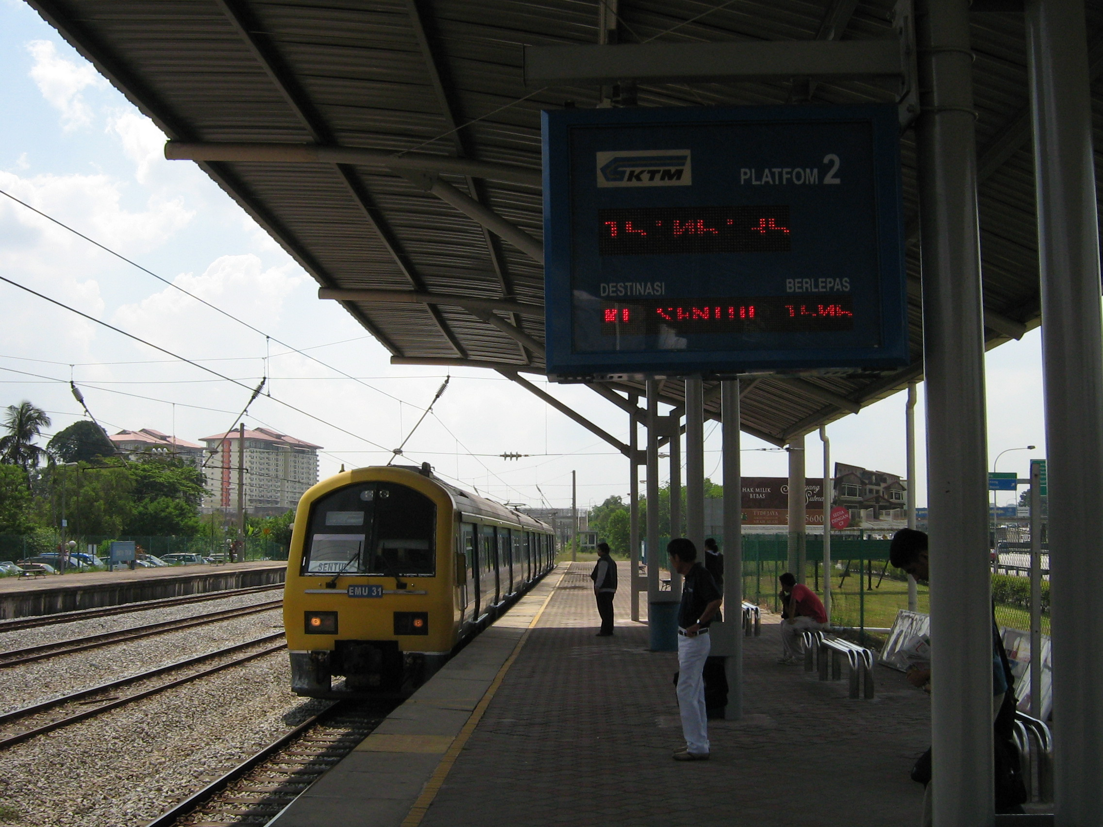 batu tiga KTM komuter station in malaysia